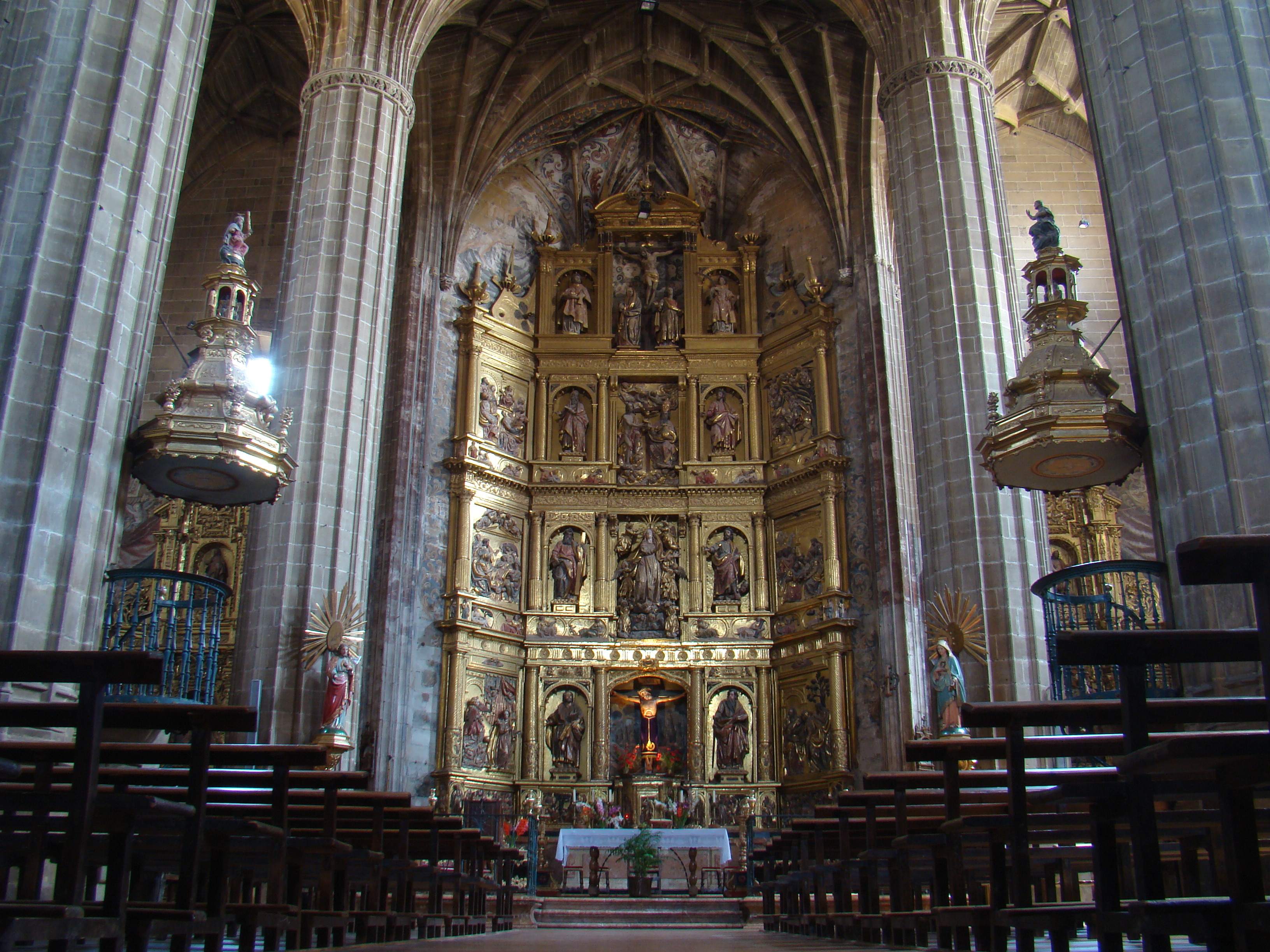 Iglesia de Nuestra Señora de la Asunción en Briones, La Rioja (España). Retablo mayor clasicista de 1626 según las trazas de Hernando de Murillas padre. Lo terminó en 1650 su hijo Hernando de Murillas y Vélez de Loyola.